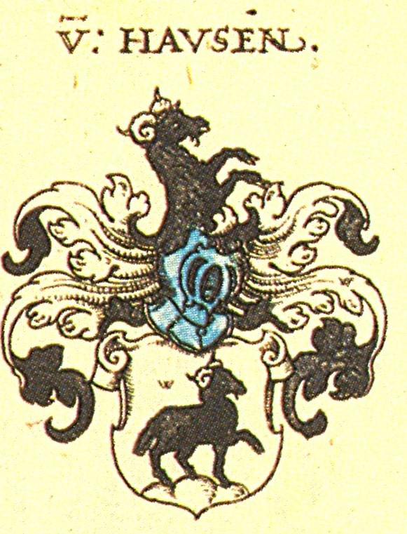 Ritterschaft und Adel in Franken von Hausen